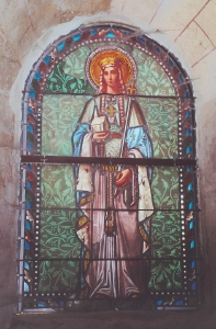 Vitrail de l'église Notre-Dame de Morthemer, dans la Vienne, placé dans la baie orientale de la crypte placée sous le chœur, et représentant Sainte-Radegonde. Elle est couronnée, revêtue d'un manteau d'hermine fleurdelisé et pourvue du sceptre (en tant que reine de France). Elle tient une église dans la main droite (Église Sainte-Radegonde de Poitiers ?). Fond orné d'un décor végétal.